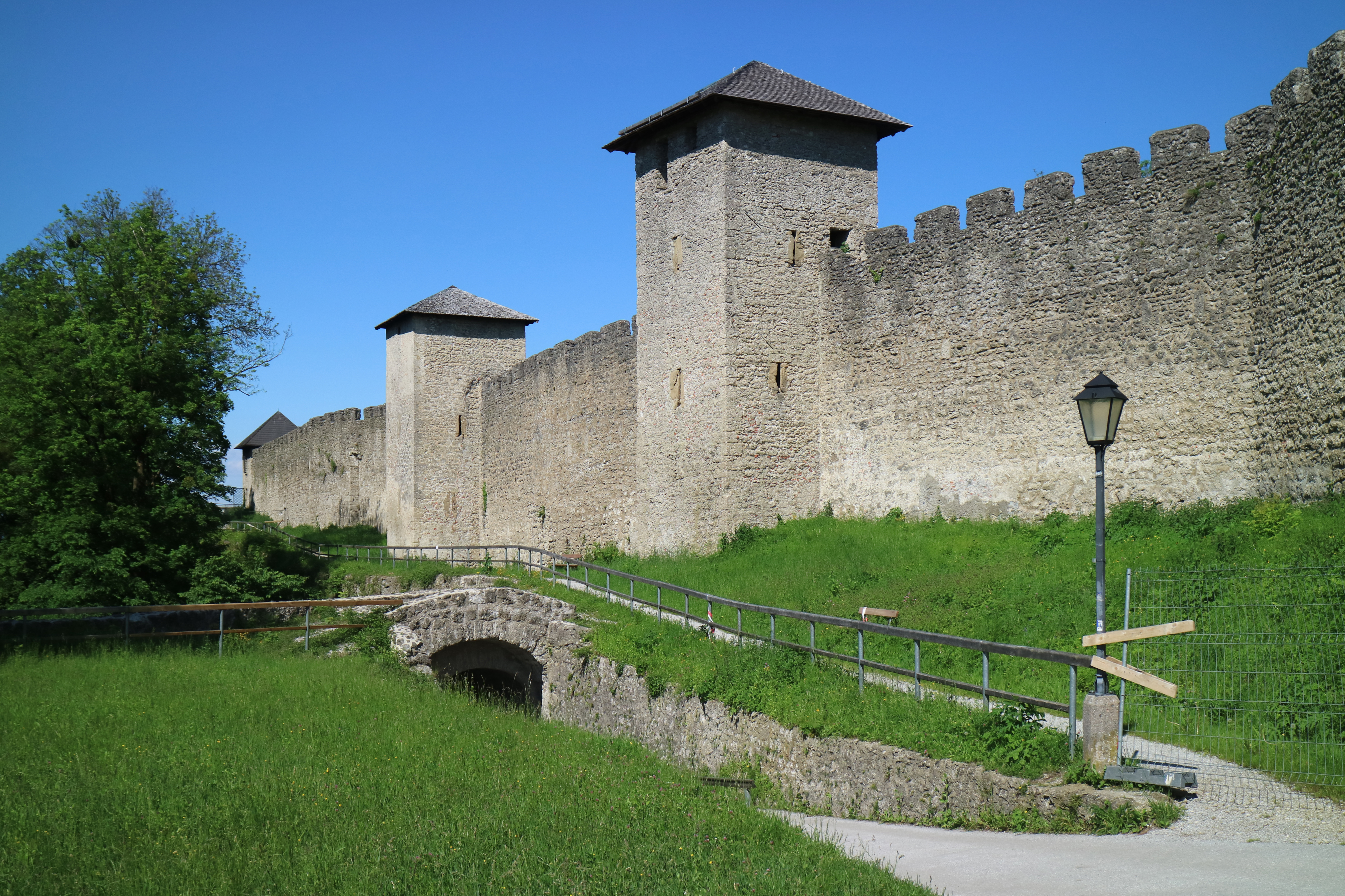 Bürgerwehr am Salzburger Mönchsberg